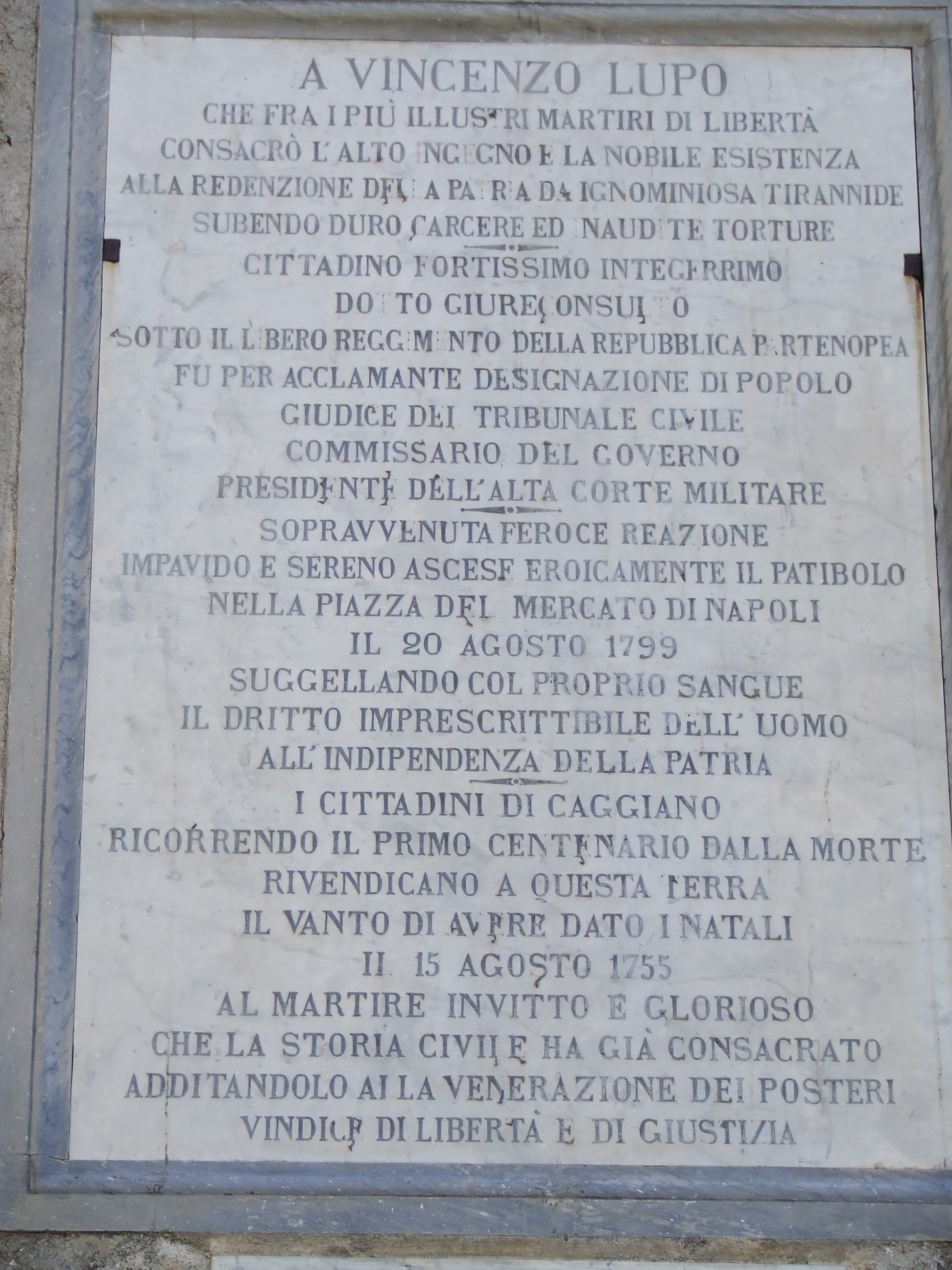 Lapide che ricorda il patriota Vincenzo Lupo di Caggiano.